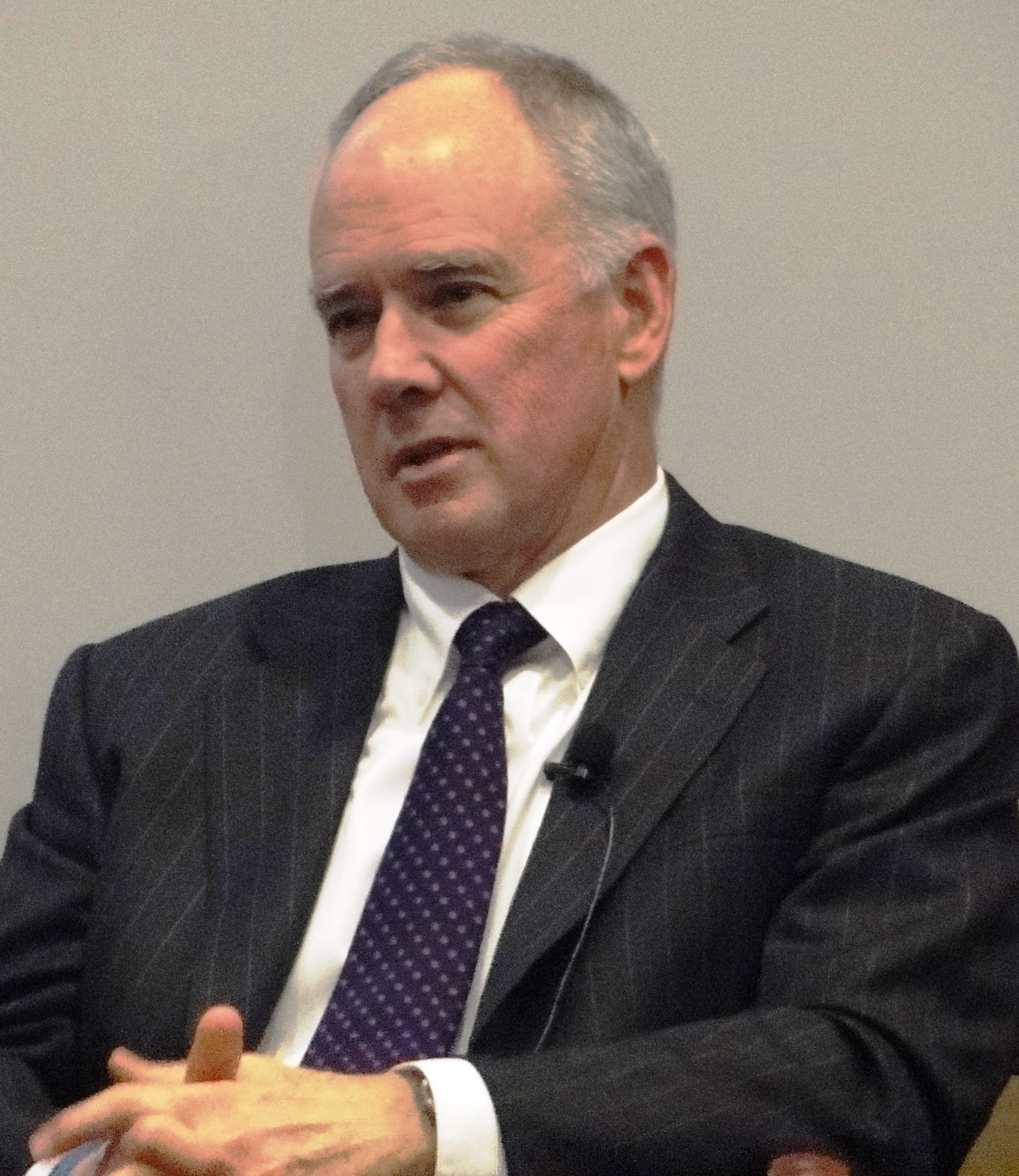 Sandy Alderson